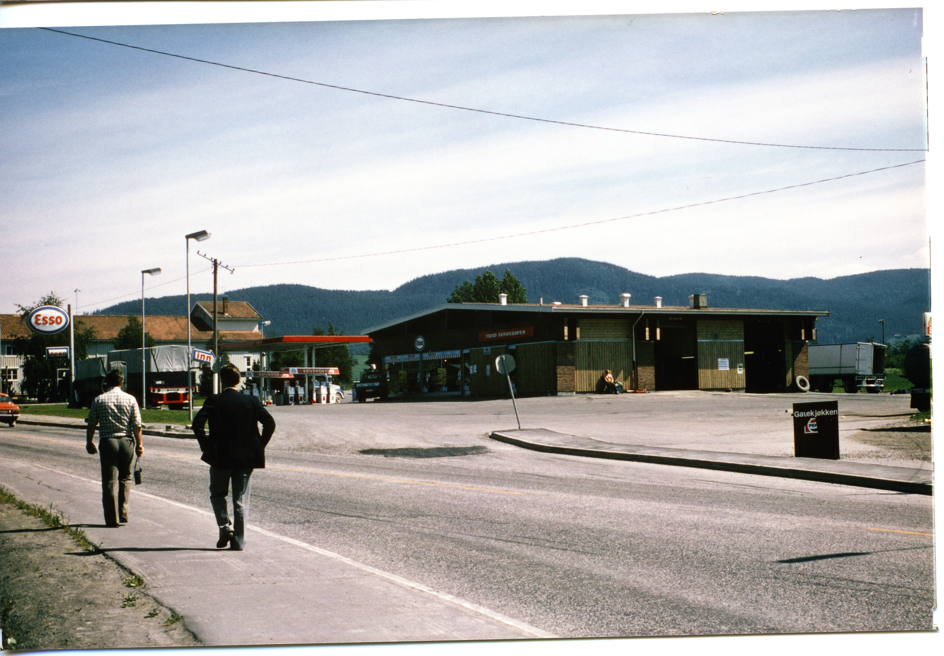 Bildet er hentet fra Arkivverket. Sone 509 Trøndelag Arkivinstitusjon : Statsarkivet i Stavanger Arkivnavn : Pa 0982 - Esso Norge A/S Sted : Norge, , , Emneord: Bensinstasjon, Olje, Petroleum Avbildet